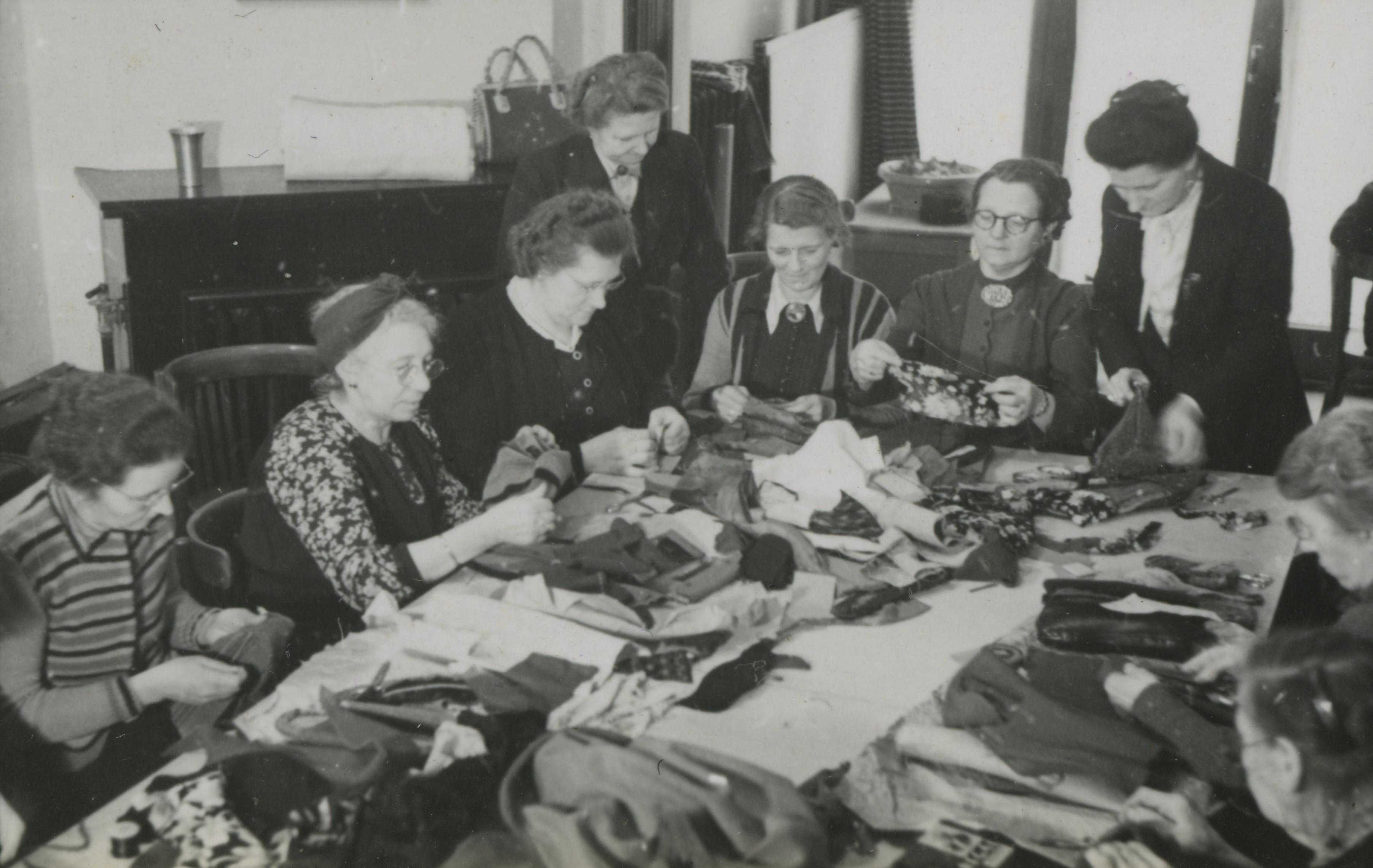 Serie van de Nationaal-Socialistische Vrouwen-Organisatie (NSVO): Een cursus voor het maken van pantoffels. Deze foto is afkomstig uit het archief van de Fotodienst der NSB.